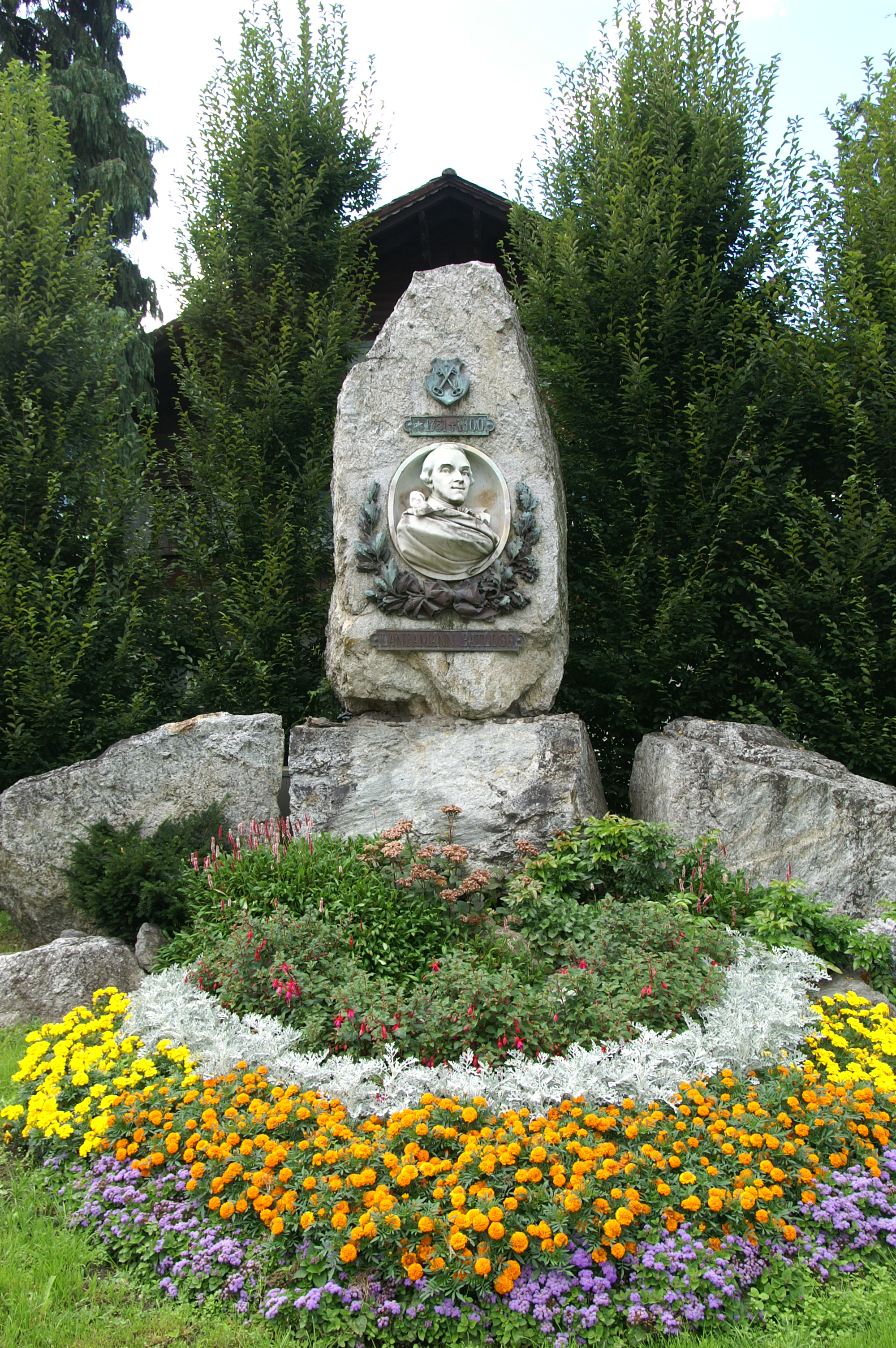 Denkmal an den Landamann Johann Josef Batlogg (* 1751, † 1800) in Schruns, Montafon